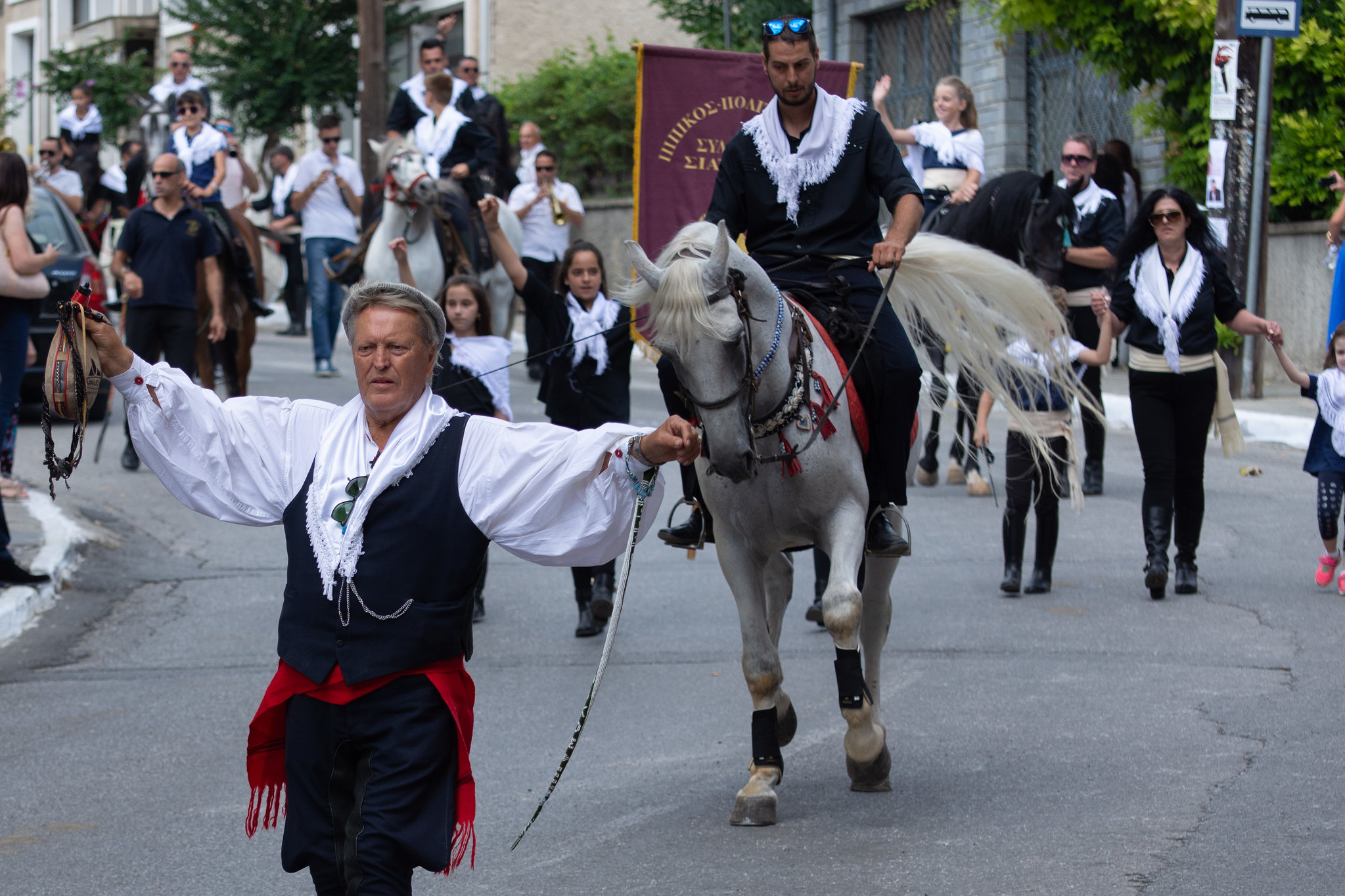 Γιορτή Δεκαπενταύγουστου στη Σιάτιστα